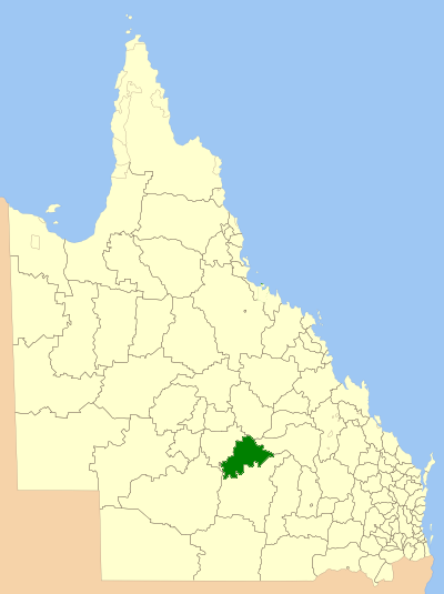 comté de Tambo